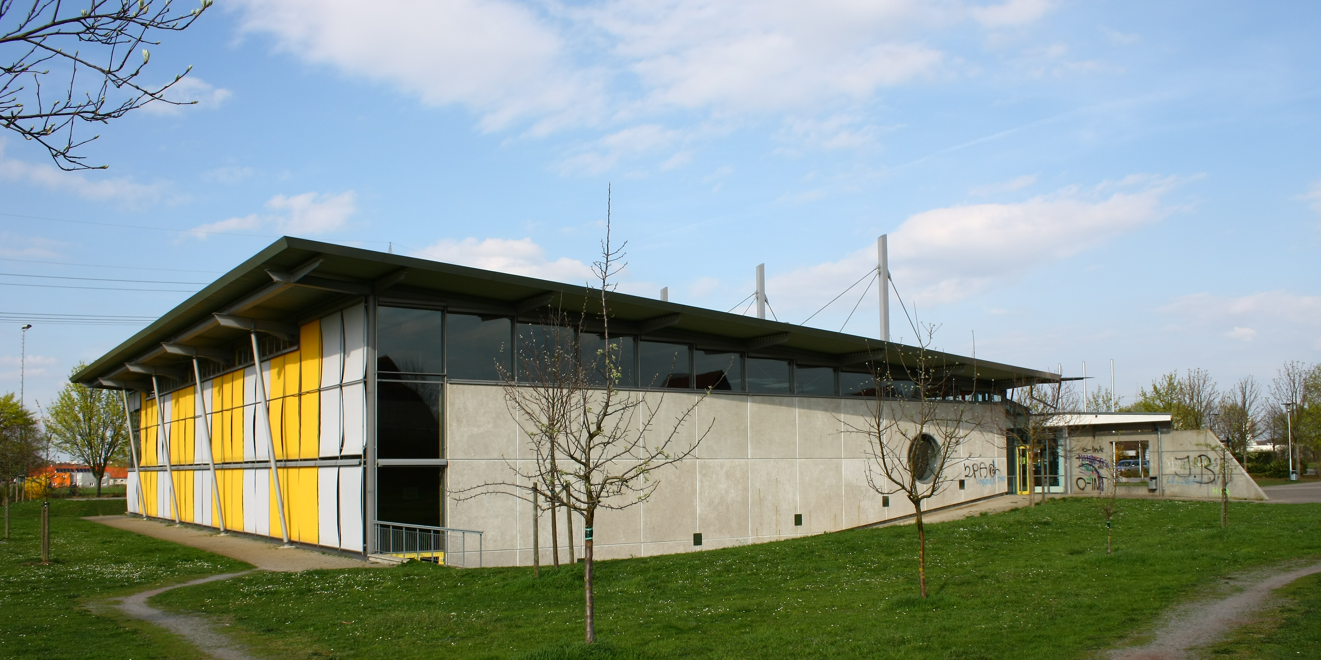 Die Eberwinhalle in Neckarsulm, Stadtteil Obereisesheim, erbaut 1995